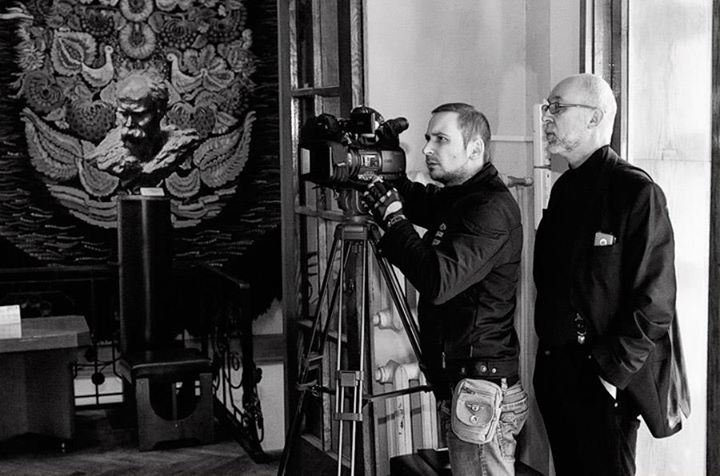 Олександр Царенко і Сергій Проскурня на зйомках сюжету в Музеї однієї книги "Кобзаря" Тараса Шевченка. Світлина Андрія Кудрявцева.)